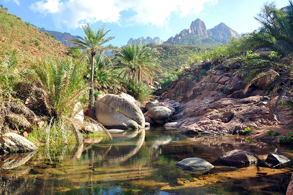 Socotra